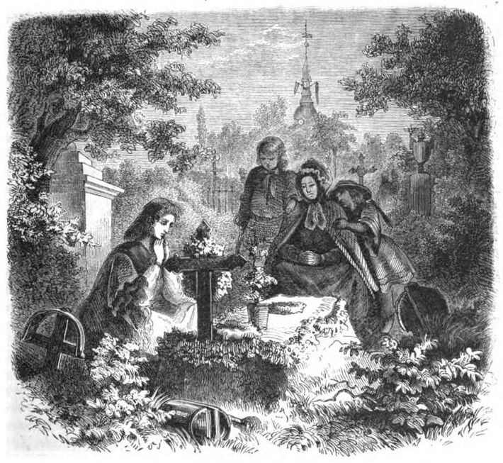 Johannisfeier in Leipzig